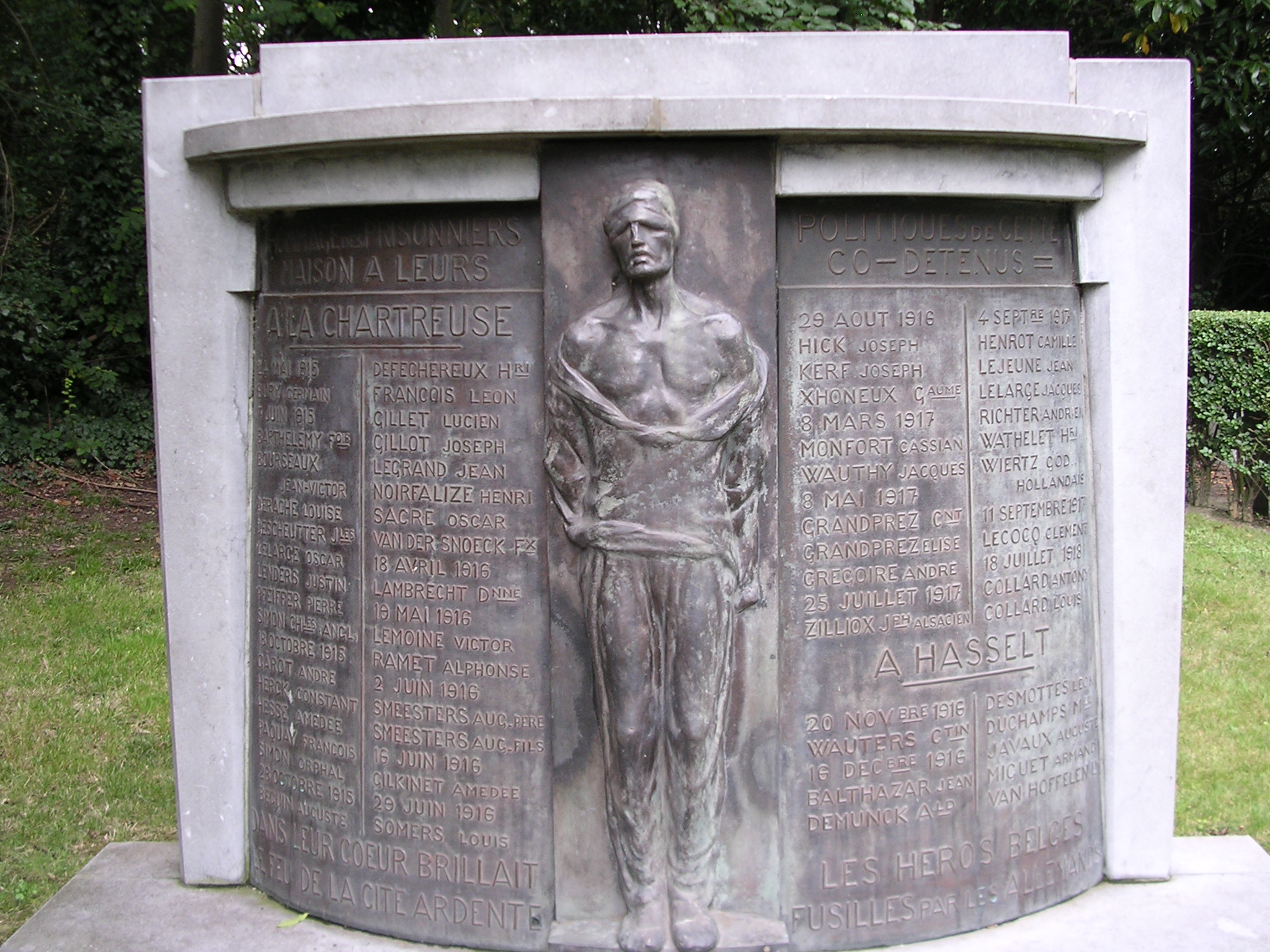 Bastion de la Chartreuse - Stèle des Fusillés 1414 - 1918